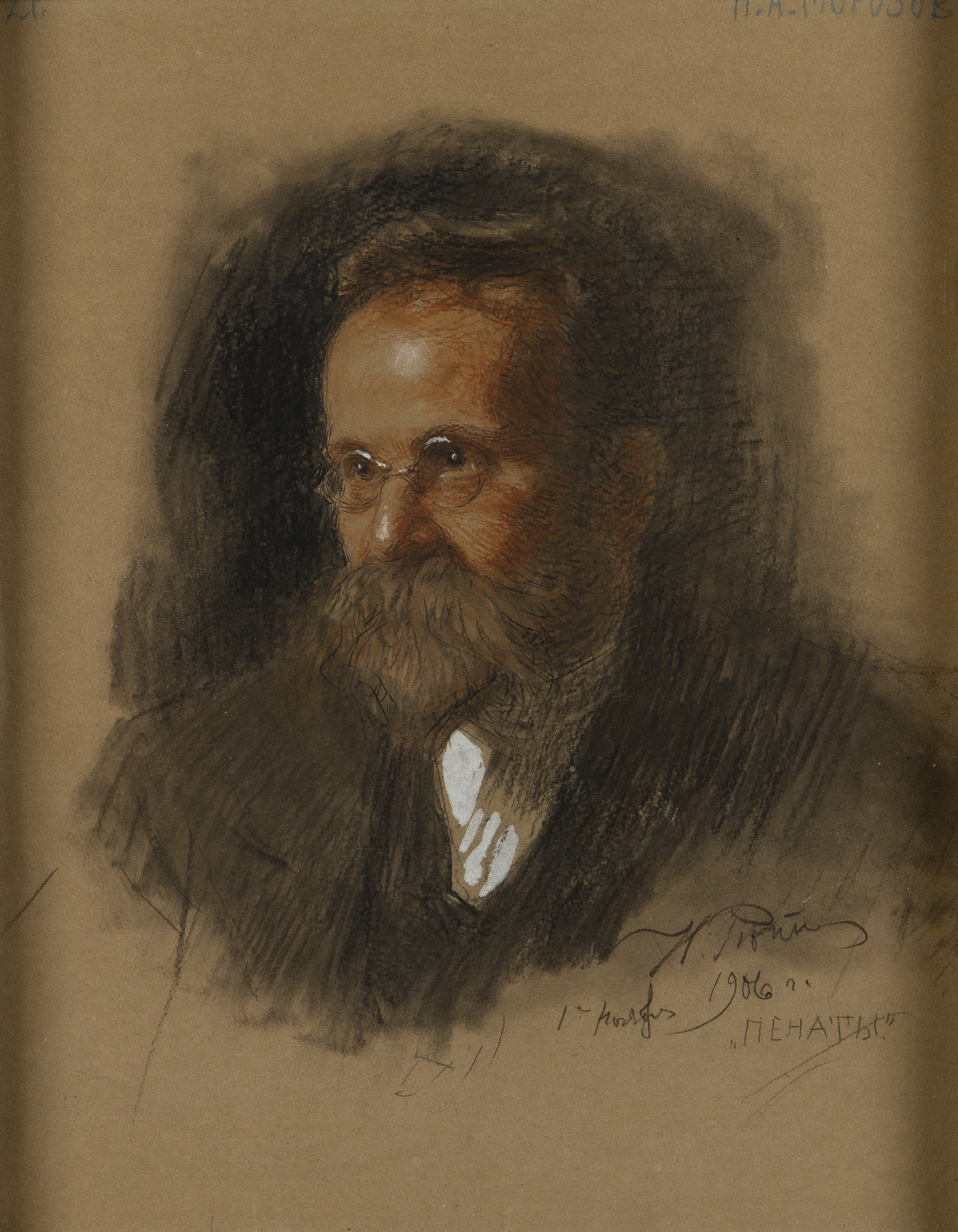 Portrait of Nikolai A. Morozov